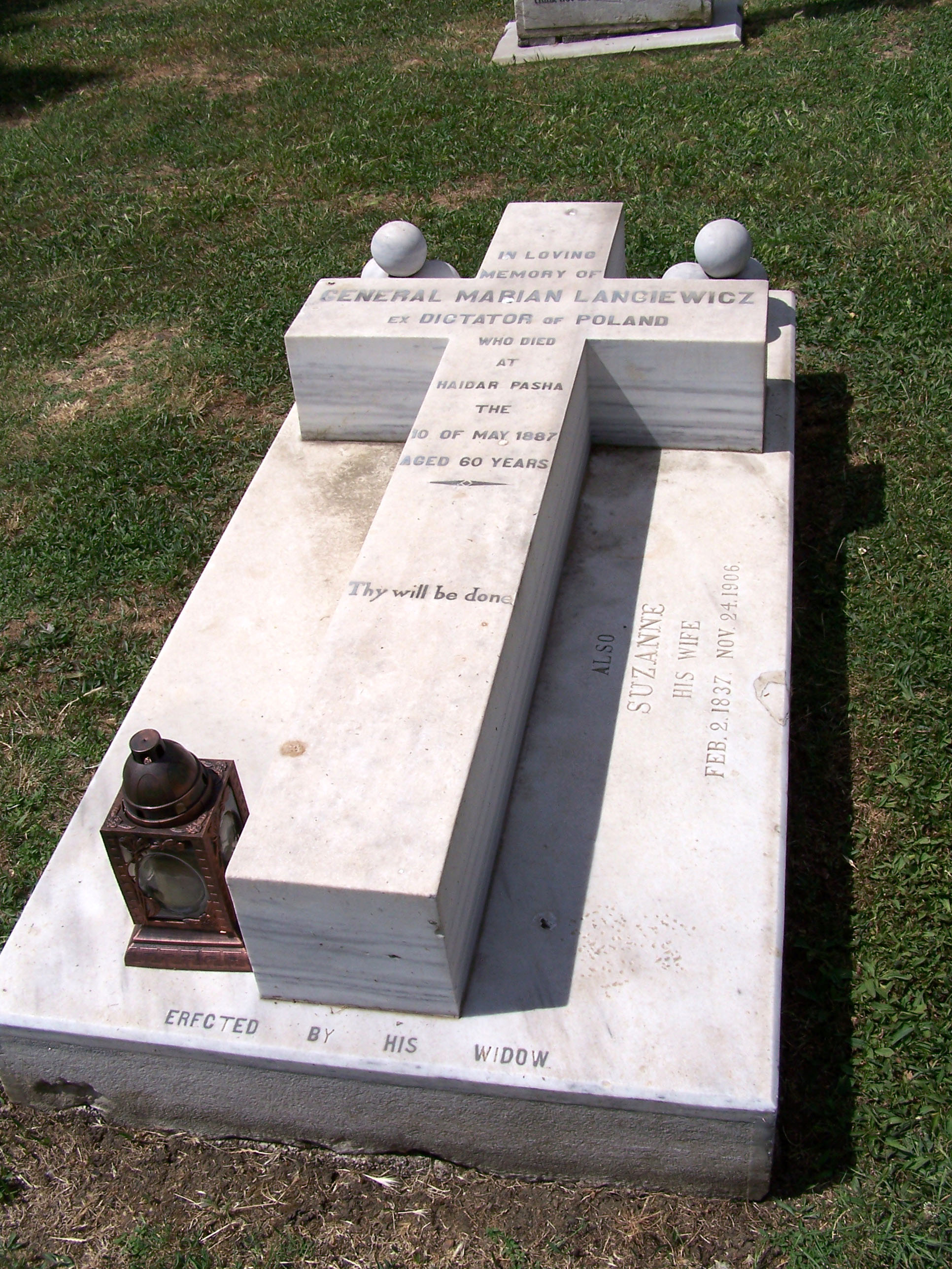 Grave of General Marian Langiewicz at Haydarpaşa Mezarlığı